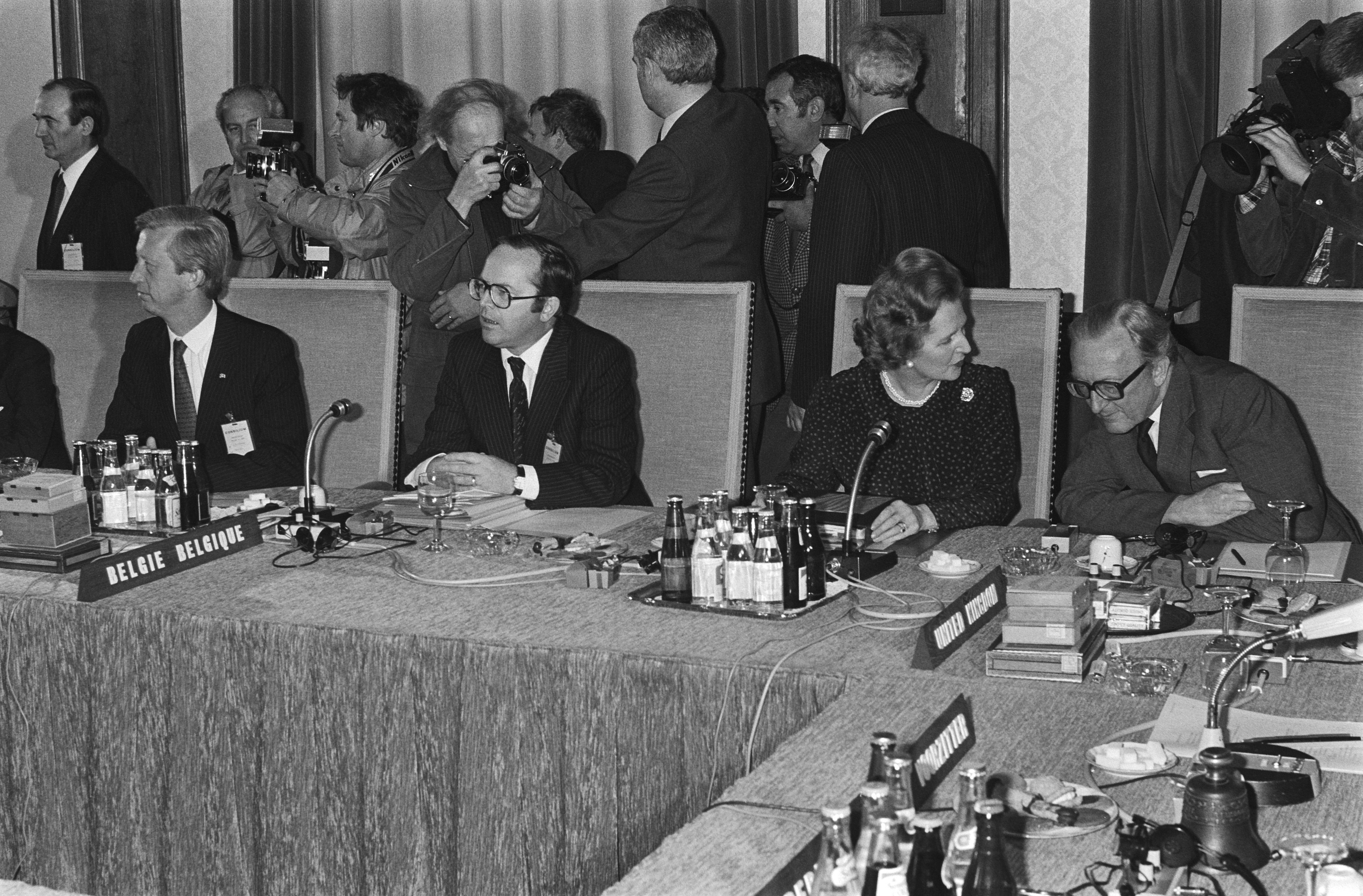 Collectie / Archief : Fotocollectie Anefo Reportage / Serie : [ onbekend ] Beschrijving : Europese Raad in Maastricht, overzicht met o.a. Margareth Thatcher (m) Datum : 23 maart 1981 Locatie : Maastricht Trefwoorden : conferenties Fotograaf : Croes, Rob C. / Anefo Auteursrechthebbende : Nationaal Archief Materiaalsoort : Negatief (zwart/wit) Nummer archiefinventaris : bekijk toegang 2.24.01.05 Bestanddeelnummer : 931-3908